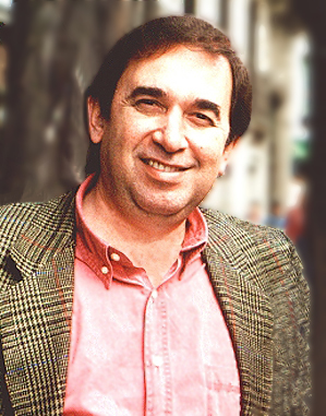 Alfredo Brito en Madrid